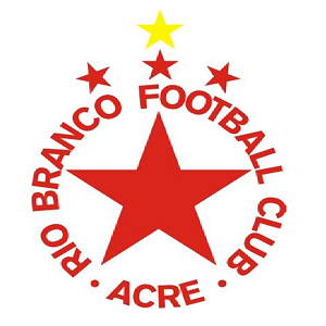 Segundo escudo do Rio Branco Football Club